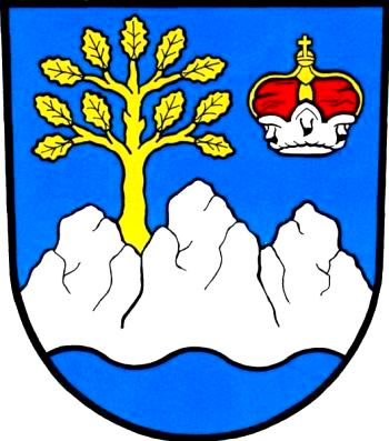 znak obce Skalice (okres Hradec Králové).